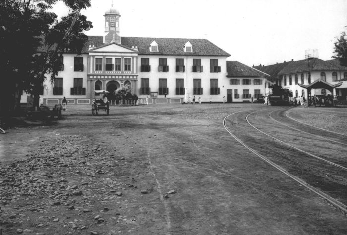 foto. Gezicht op het stadhuis van Batavia en de tramhalte